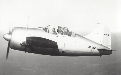 Prototype XF2A-2 (Bu No 0451) van de Brewster Model 399E (F2A-2), die door de Royal Air Force in gebruik werd genomen en Buffalo Mk.I werd geheten.